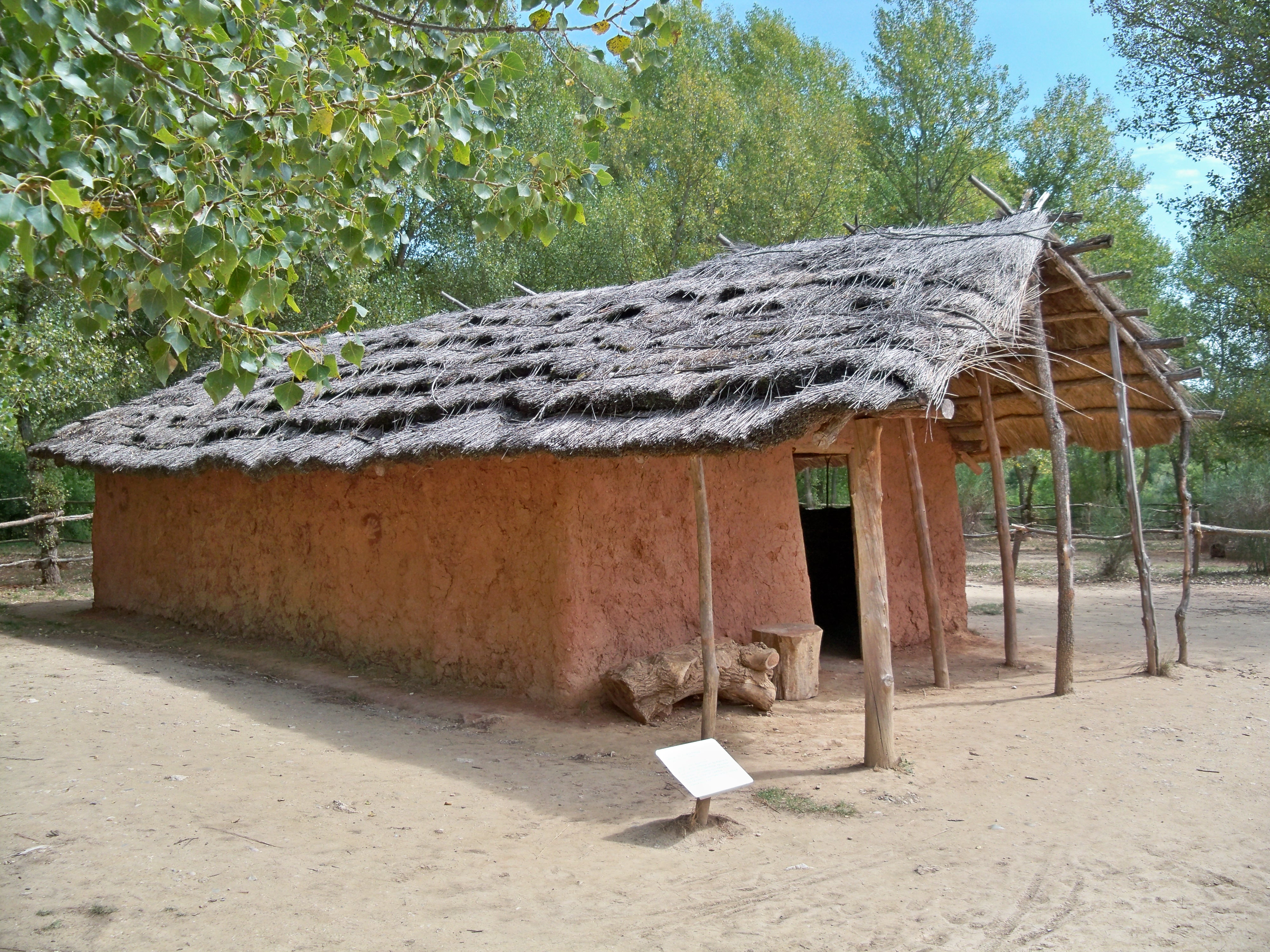 Reconstitution d'habitation néolithique à Quinson (04), France